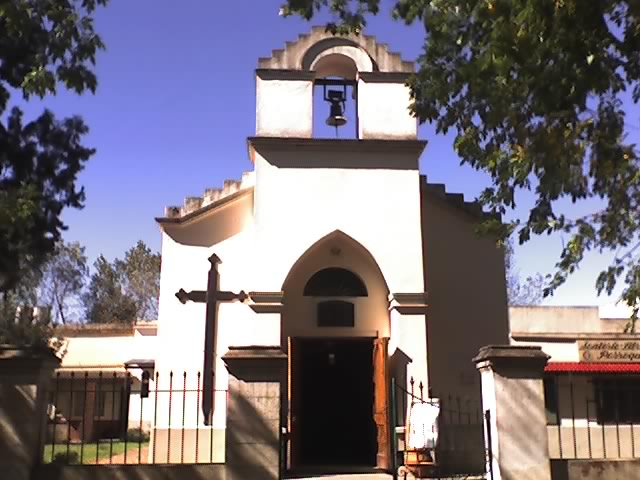 Iglesia de Nuestra Señora del Rosario, ciudad de Pontevedra, Provincia de Buenos Aires, Argentina.